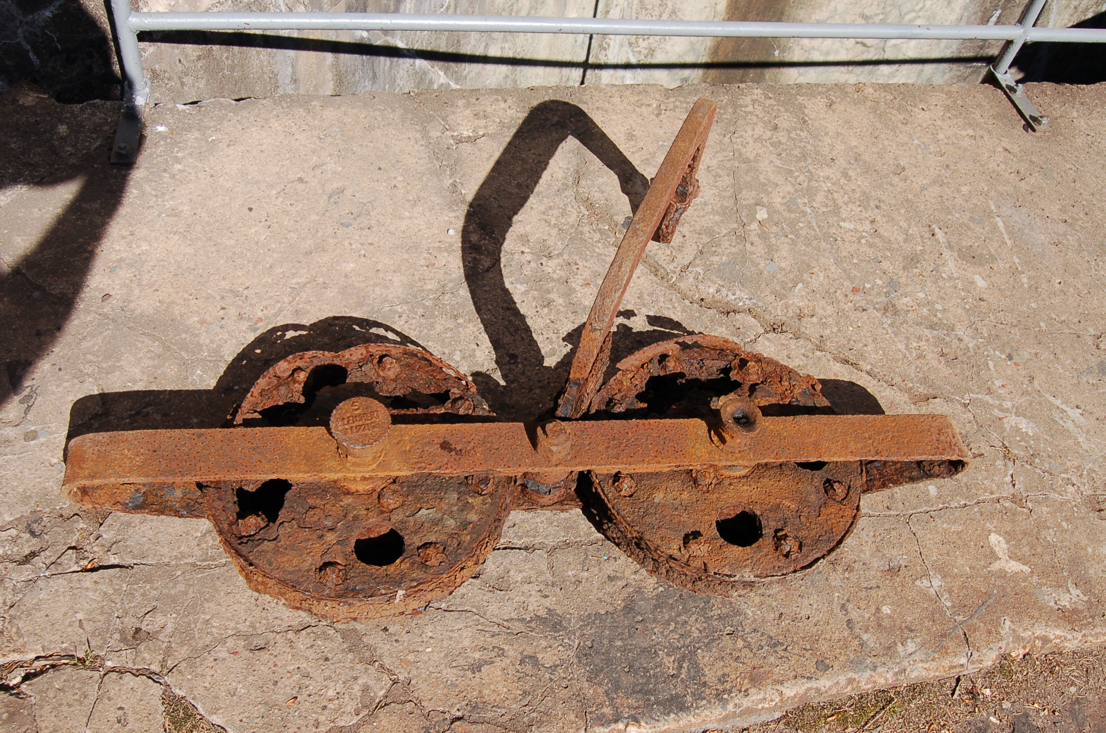 Běhoun